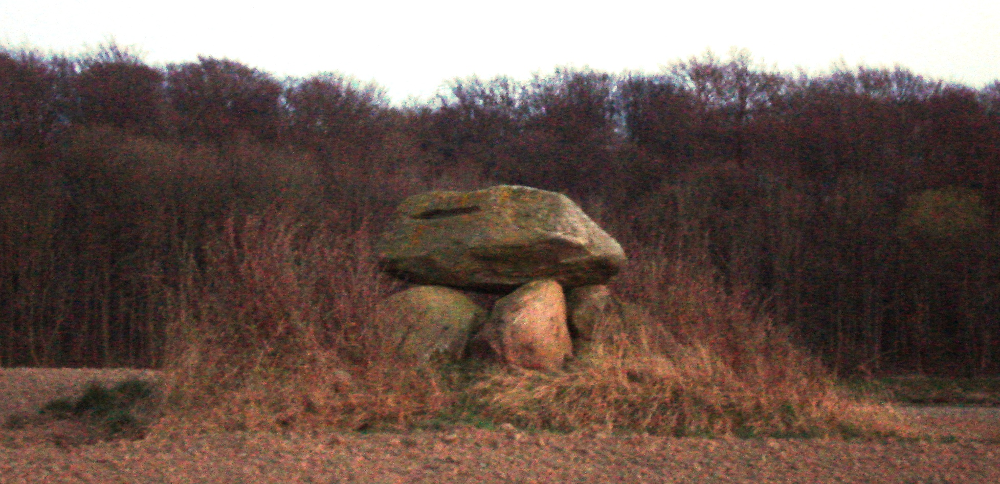 Der Dolmen bei Kuholzberg